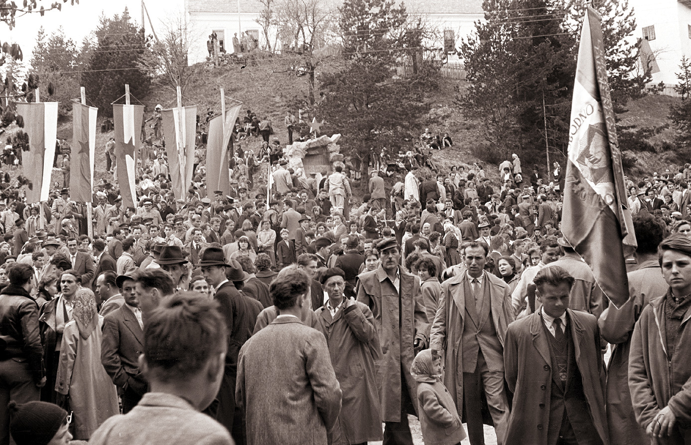 Proslava v čast 40. obletnice KPJ v Duhu na Ostrem vrhu